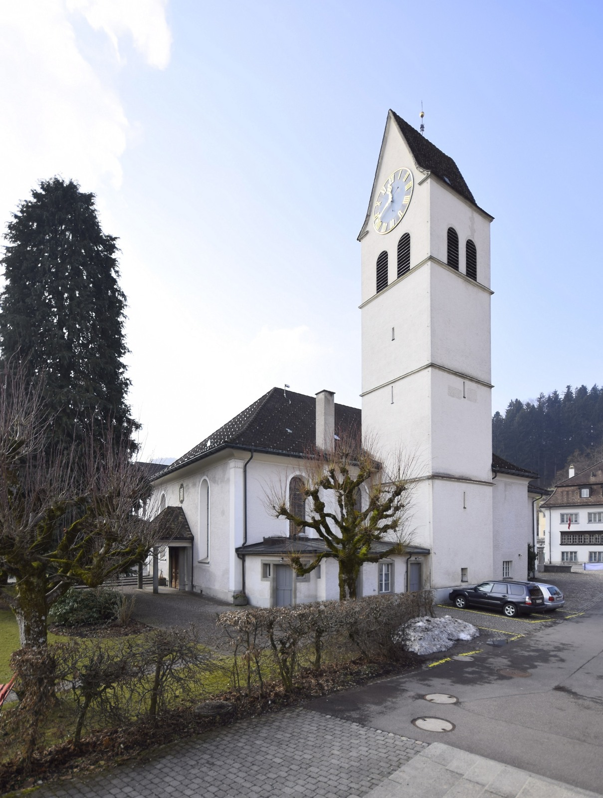 Reformierte Kirche